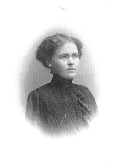 Das Bild zeigt Elisabeth Schlachter verh. Baumann 1911 in Rom, im Todesjahr ihres Vaters, Franz Eugen Schlachter.